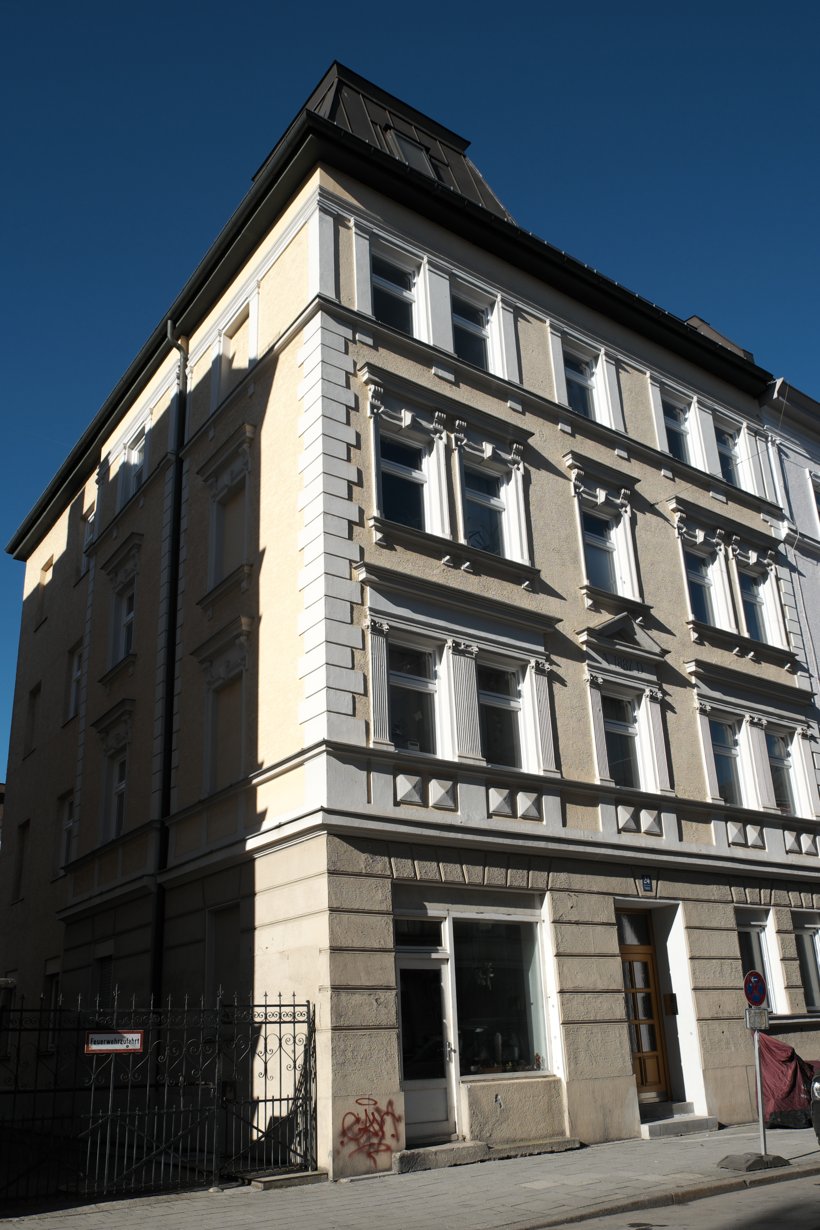 Mietshaus in der Parkstraße 24 im Stadtbezirk Schwanthalerhöhe in München (Bayern/Deutschland)